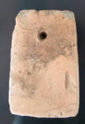 Pesa de teler